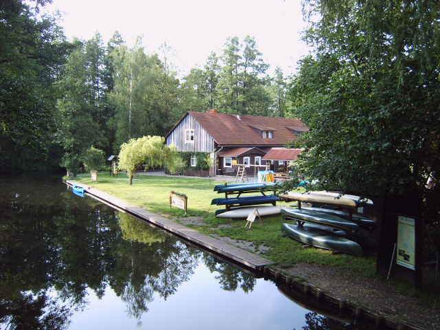 Dieses Bootshaus,kann man von den westlichen Ortseingang finden, wenn man über einer kleinen Brücke läuft.Gleich wenn man eine Kurve nach links fährt,kommt eine Schleuse,die nach Lübbenau führt.In Lübbenau ist auch das Schwimmbad "Spreewelten" wo man mit Pinguinen schwimmen kann.